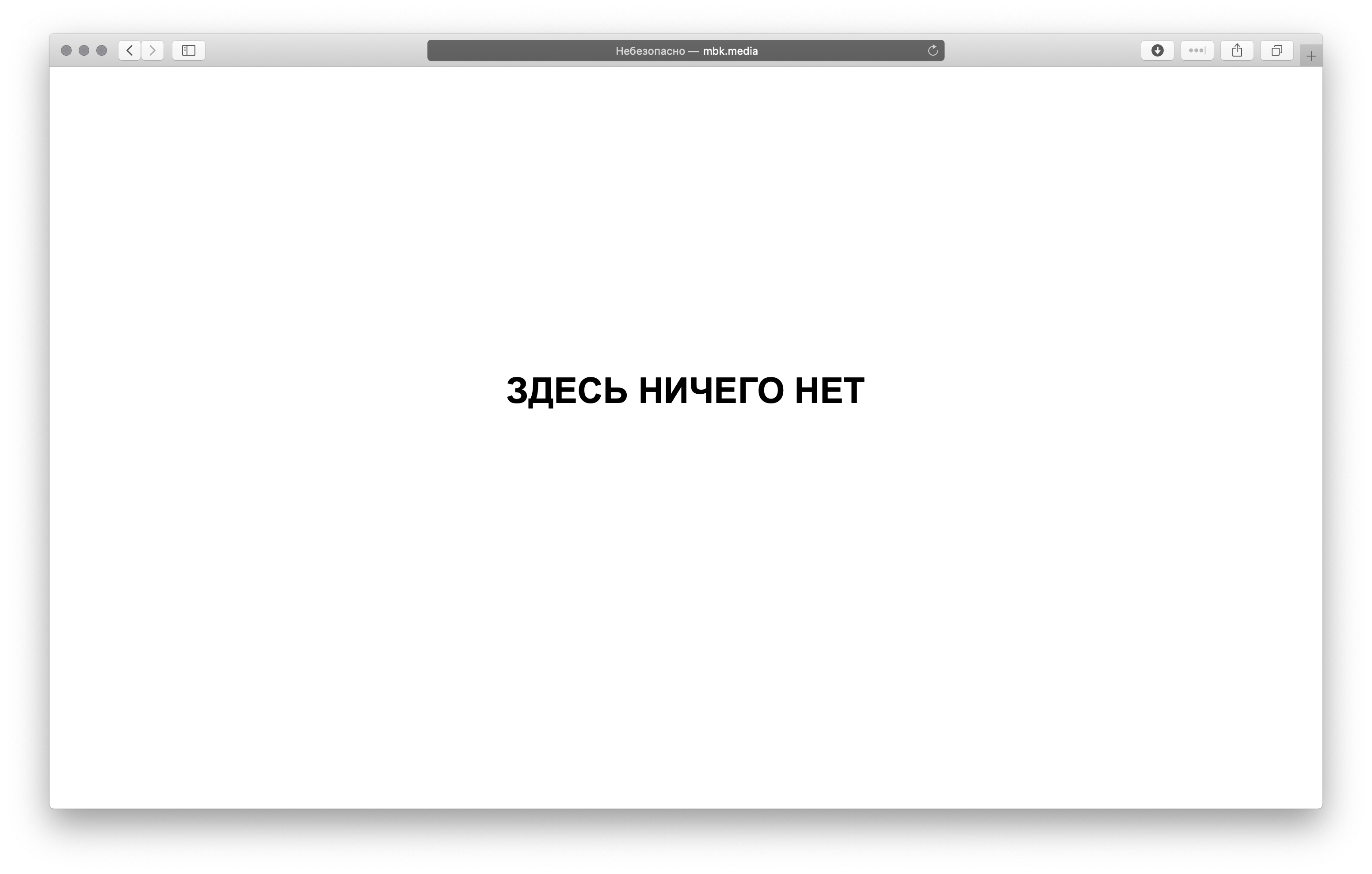 Заглушка на домене mbk.media.